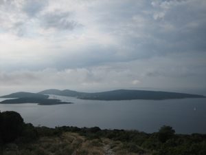 Ilovik strait in the northern Croatian Adriatic; as seen from the Losinj island; islands Ilovik (right) and Sveti Petar (left) are visible / Ilovicka vrata vidjena s juznog dijela Losinja. Lijevo je otok Sveti Petar, a desno Ilovik.